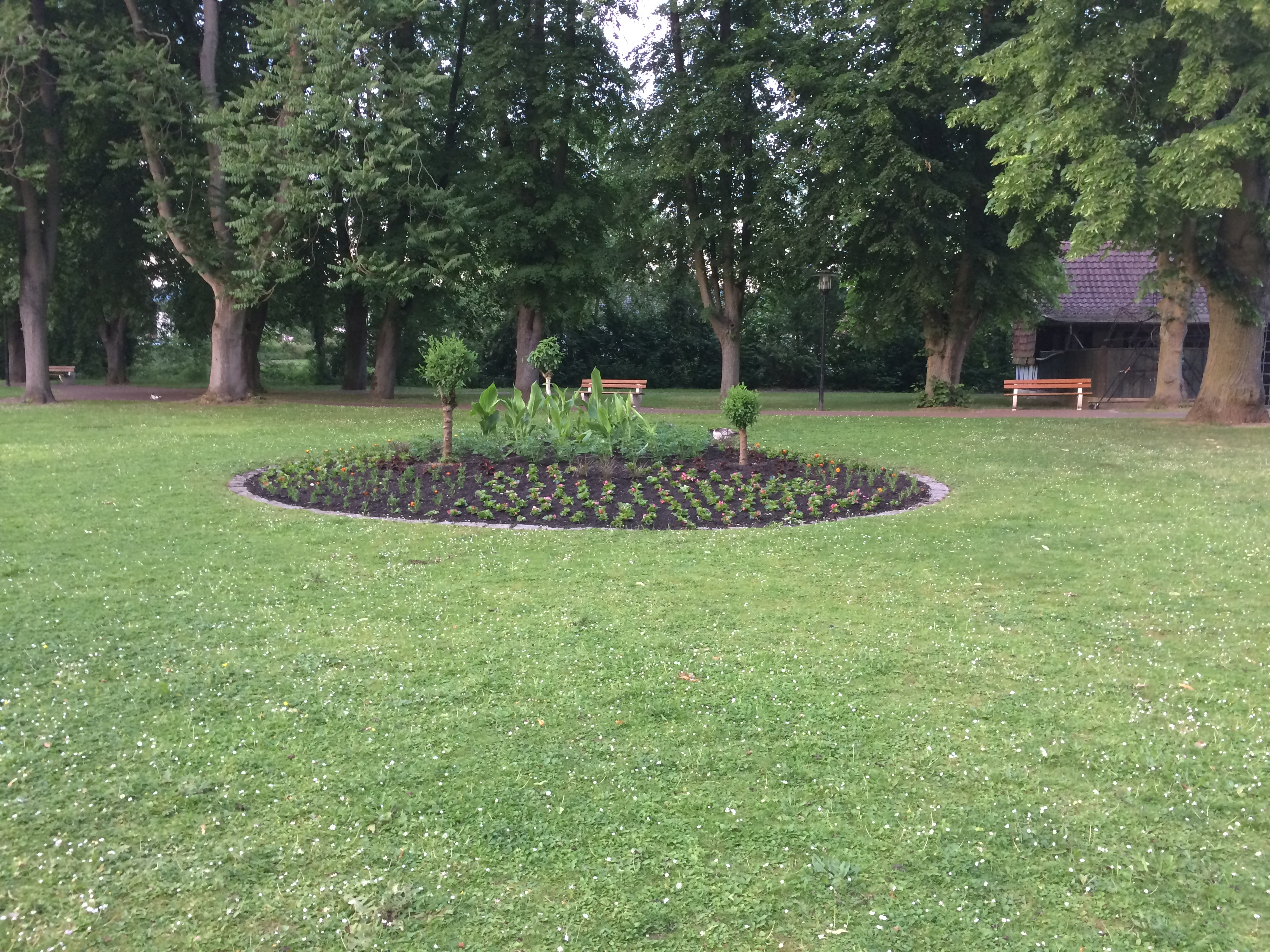 Kurpark in Bad Sooden-Allendorf 2018